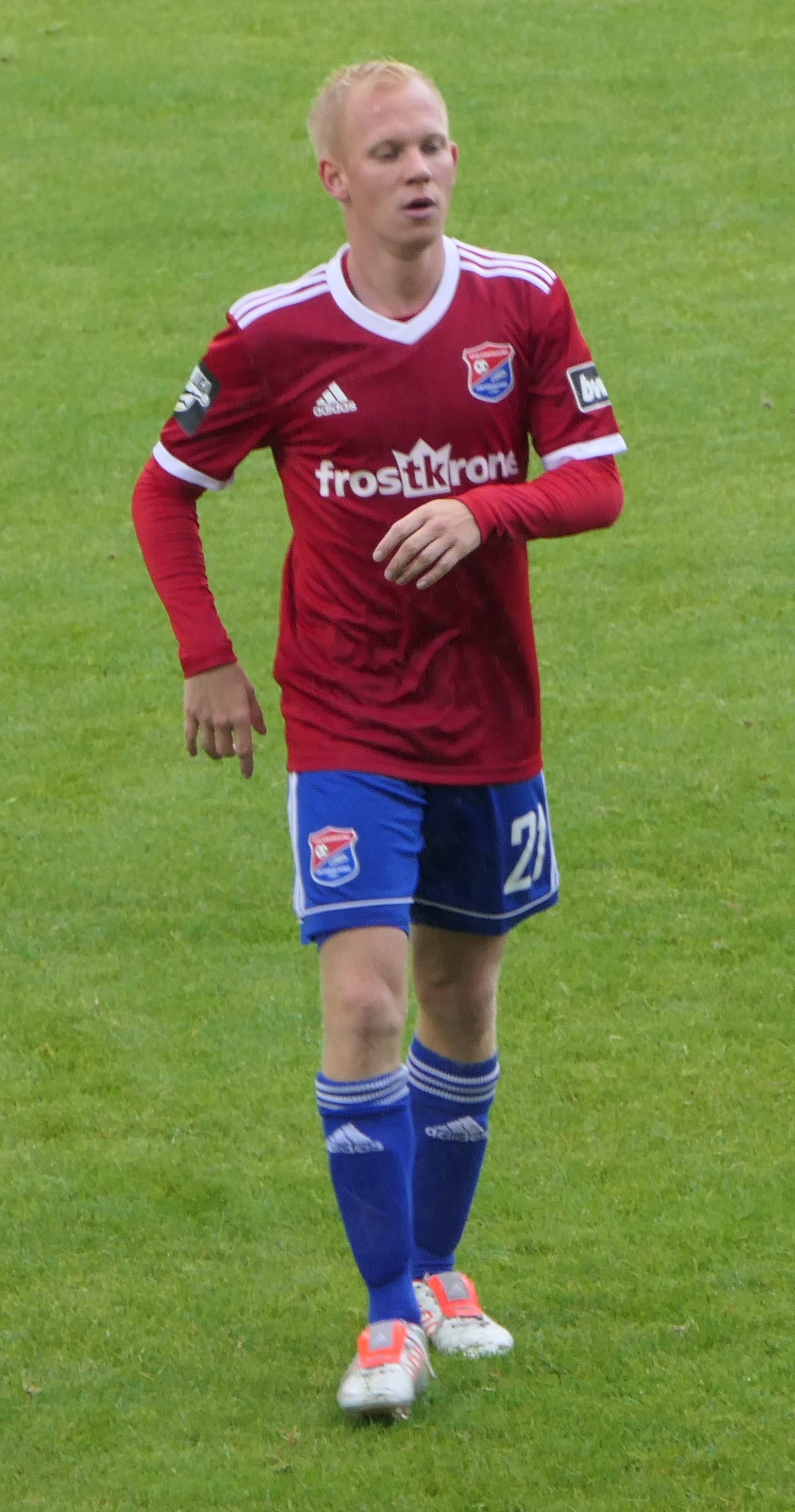 Der Fussballprofi Sascha Bigalke im Trikot der SpVgg Unterhaching beim Heimspiel gegen Eintracht Braunschweig am 01.09.2018.